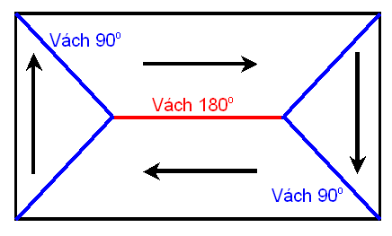 Hình này do Deshi tạo ra